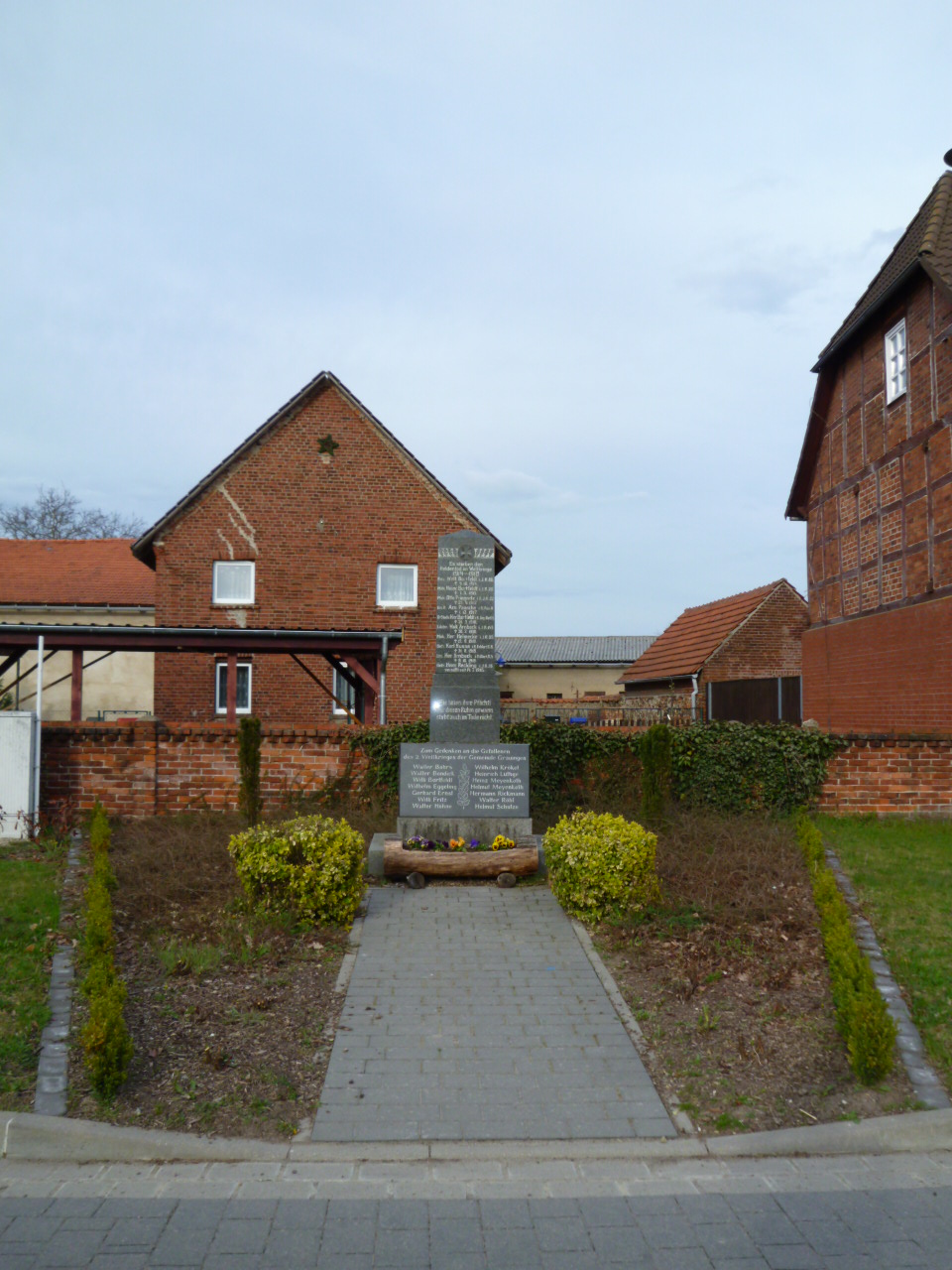 Calvörde-Grauingen, am Dorfplatz, Kriegerdenkmalsystem